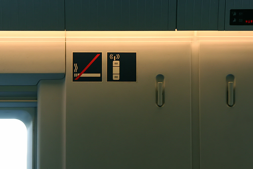 Im Zug angebrachtes Symbol für die Handyzone im Intercityexpress.